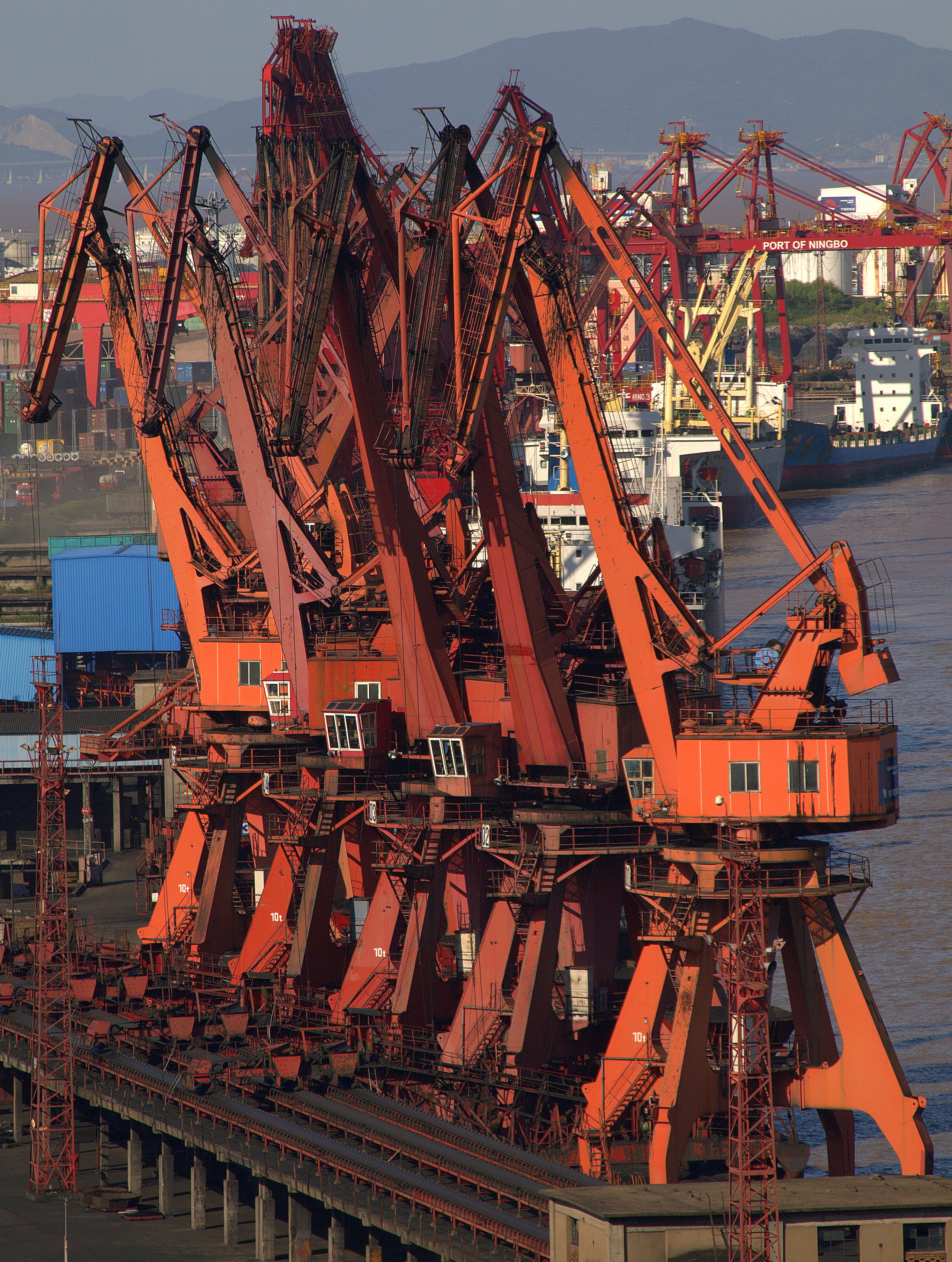 镇海港吊机